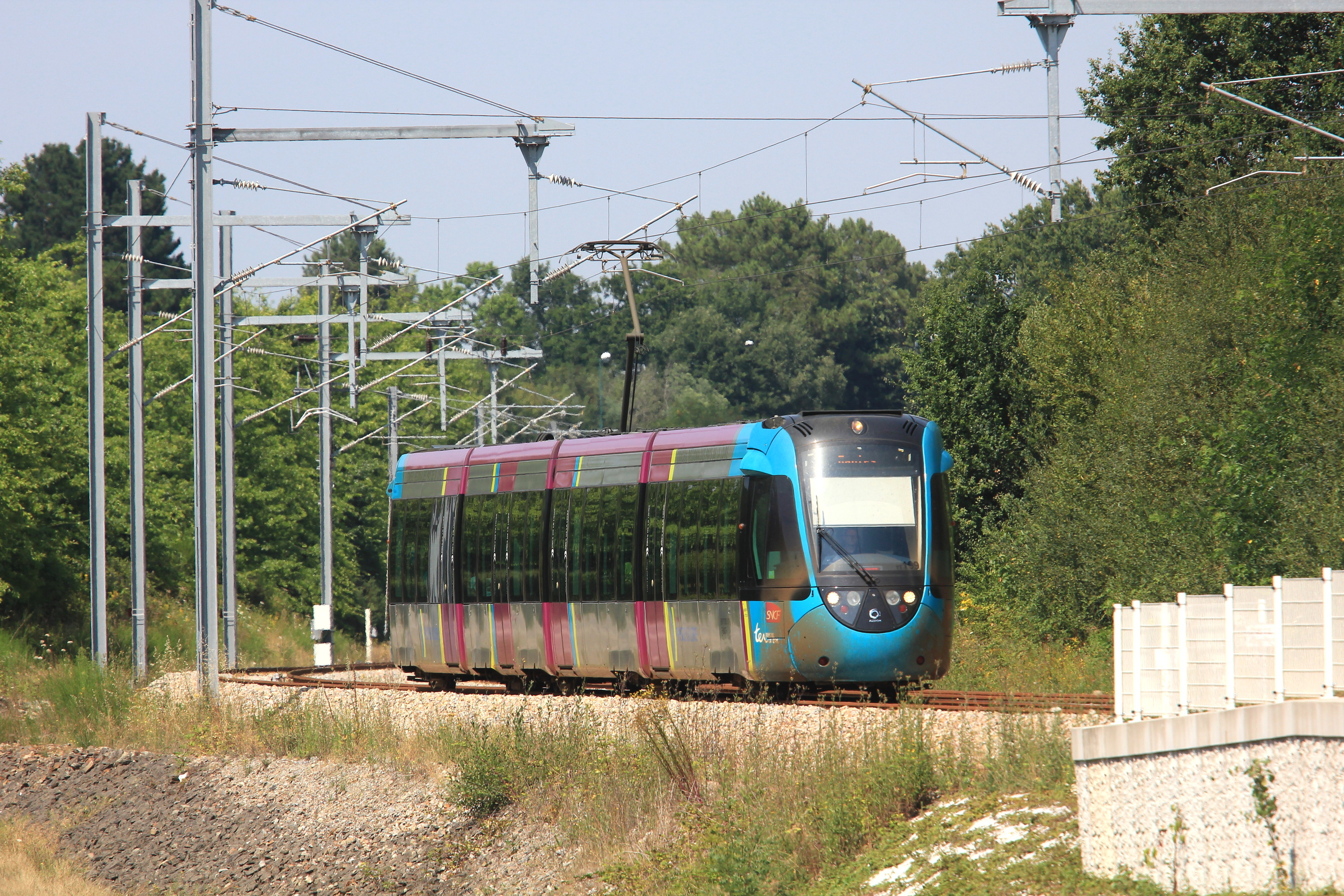 Un TER Sucé - Nantes arrive en gare de La Chapelle-Centre.